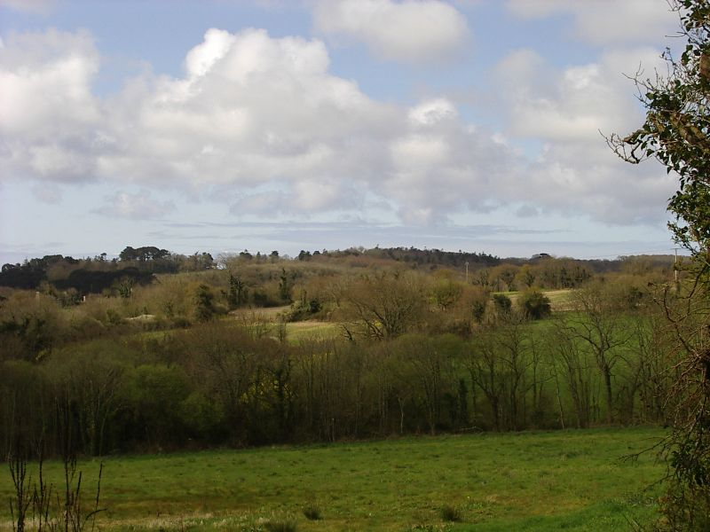 Bocage dans le Cap Sizun (Finistère, France)